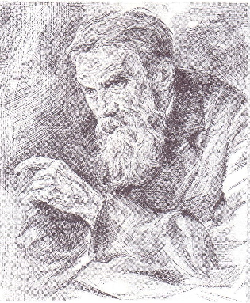 Abbildung des Original-Kupferstichs von Heinrich Wolff